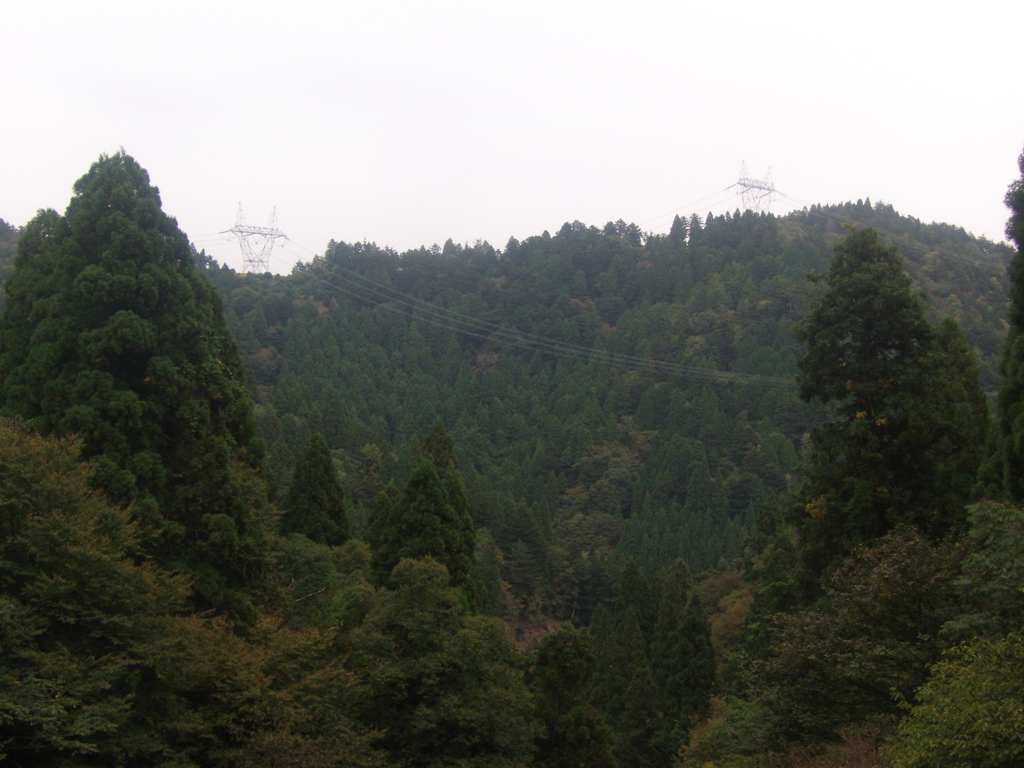 京都丹波高原国定公園を横切る送電線 京都市左京区の湯槽谷